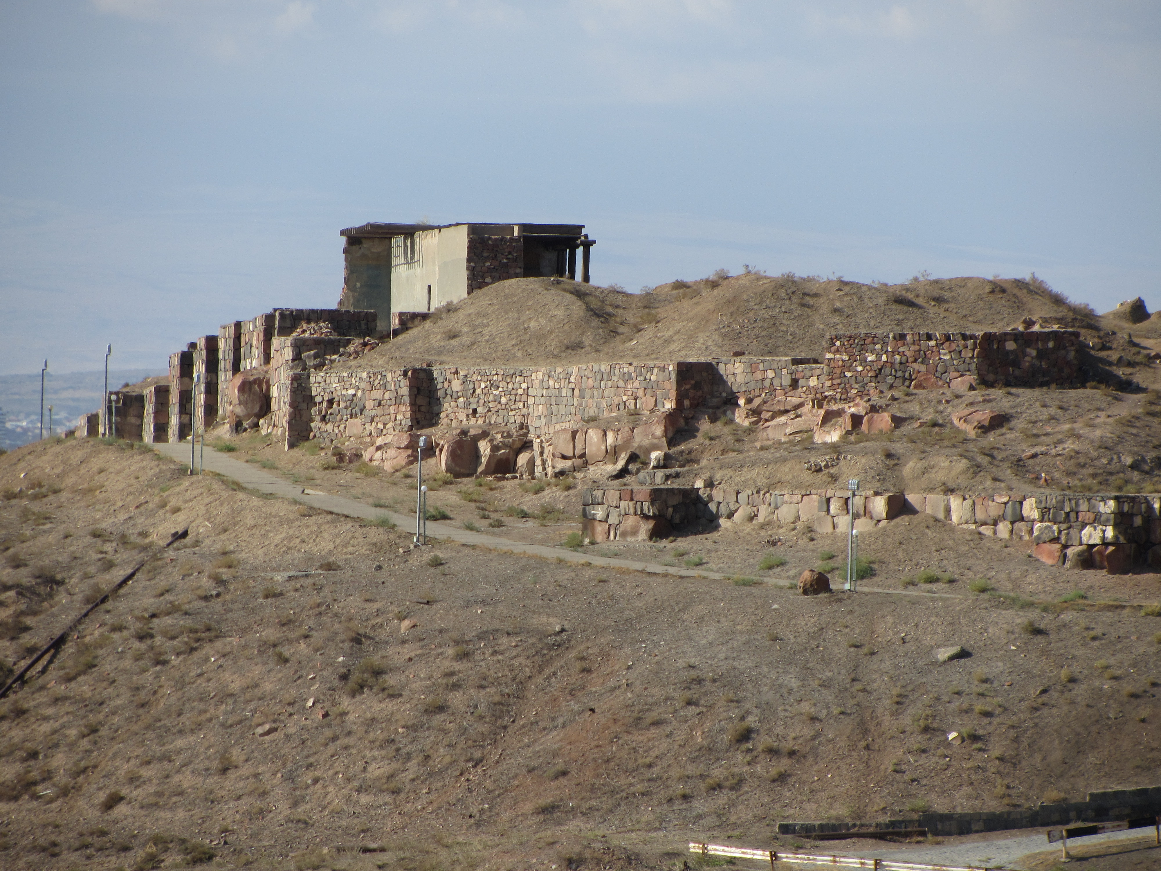 Urartian Fortress Erebuni, Yerevan, Armenia